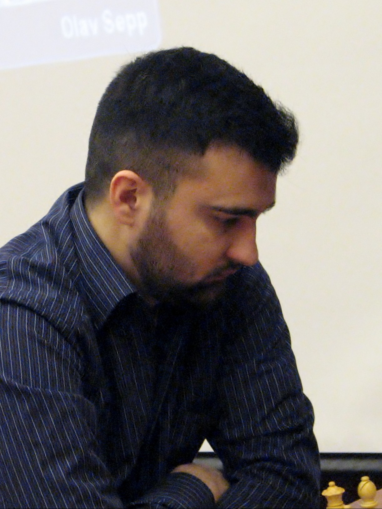 Igor Kovalenko kiirmaleturniiril "Meenutades Paul Kerest" Meelis Kanepi vastu mängimas